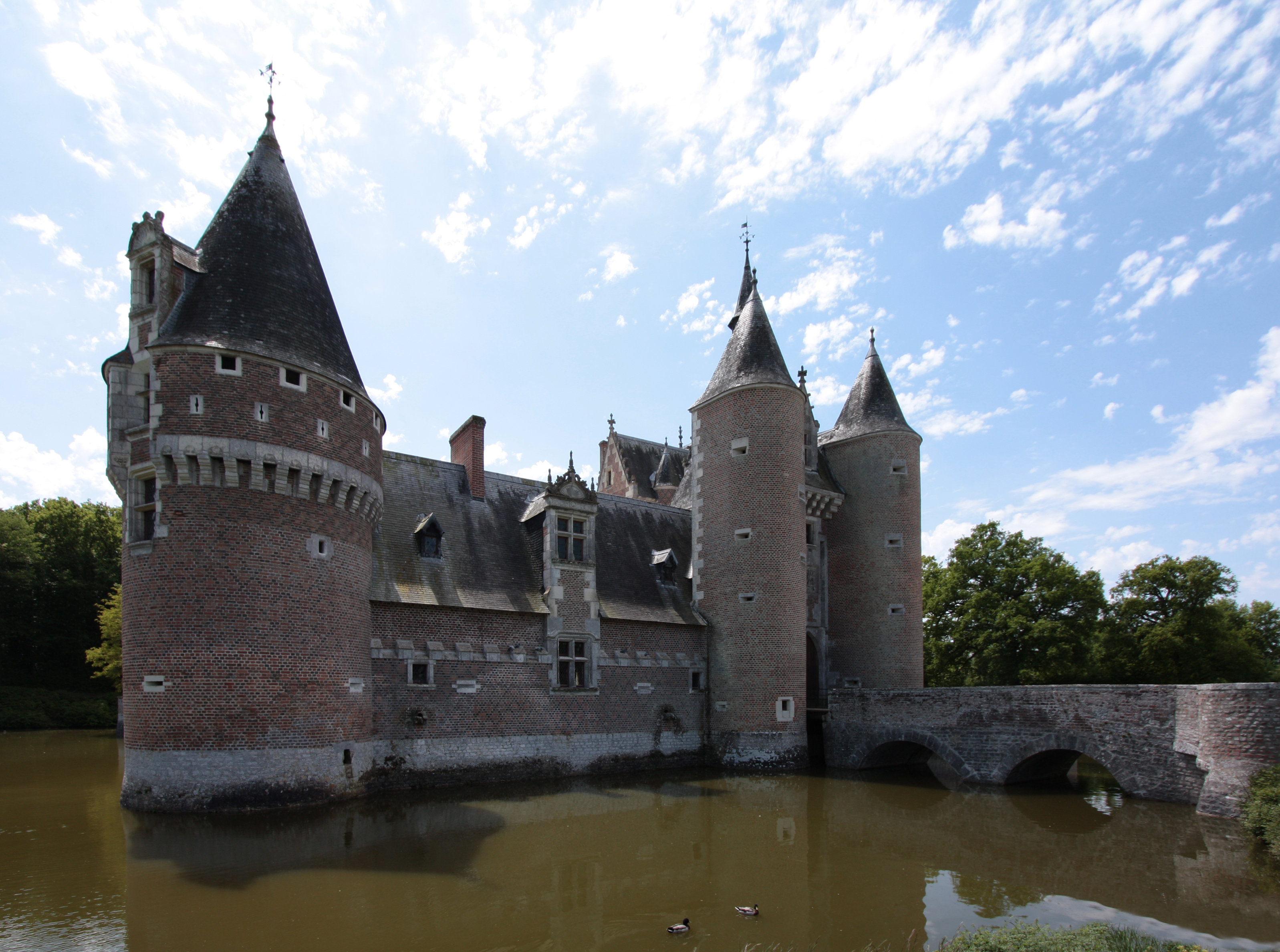 Schloss Le Moulin in der Kommune Lassay-sur-Croisne im Departement Loir-et-Cher/Frankreich.